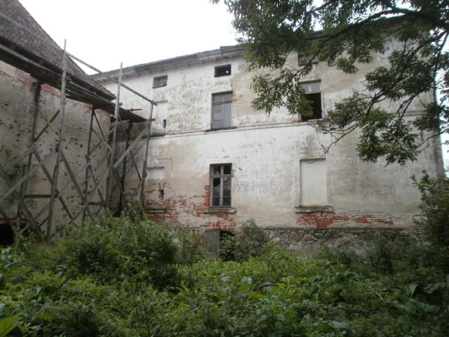 Mõisa põhjasein. Hoone keldriosa võib sisaldada keskaegsete ehitiste osi.